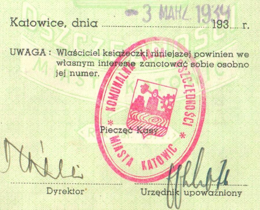 Fragment książeczki oszczędnościowej wydanej przez Komunalną Kasę Oszczędności miasta Katowic (wraz z jej pieczęcią)